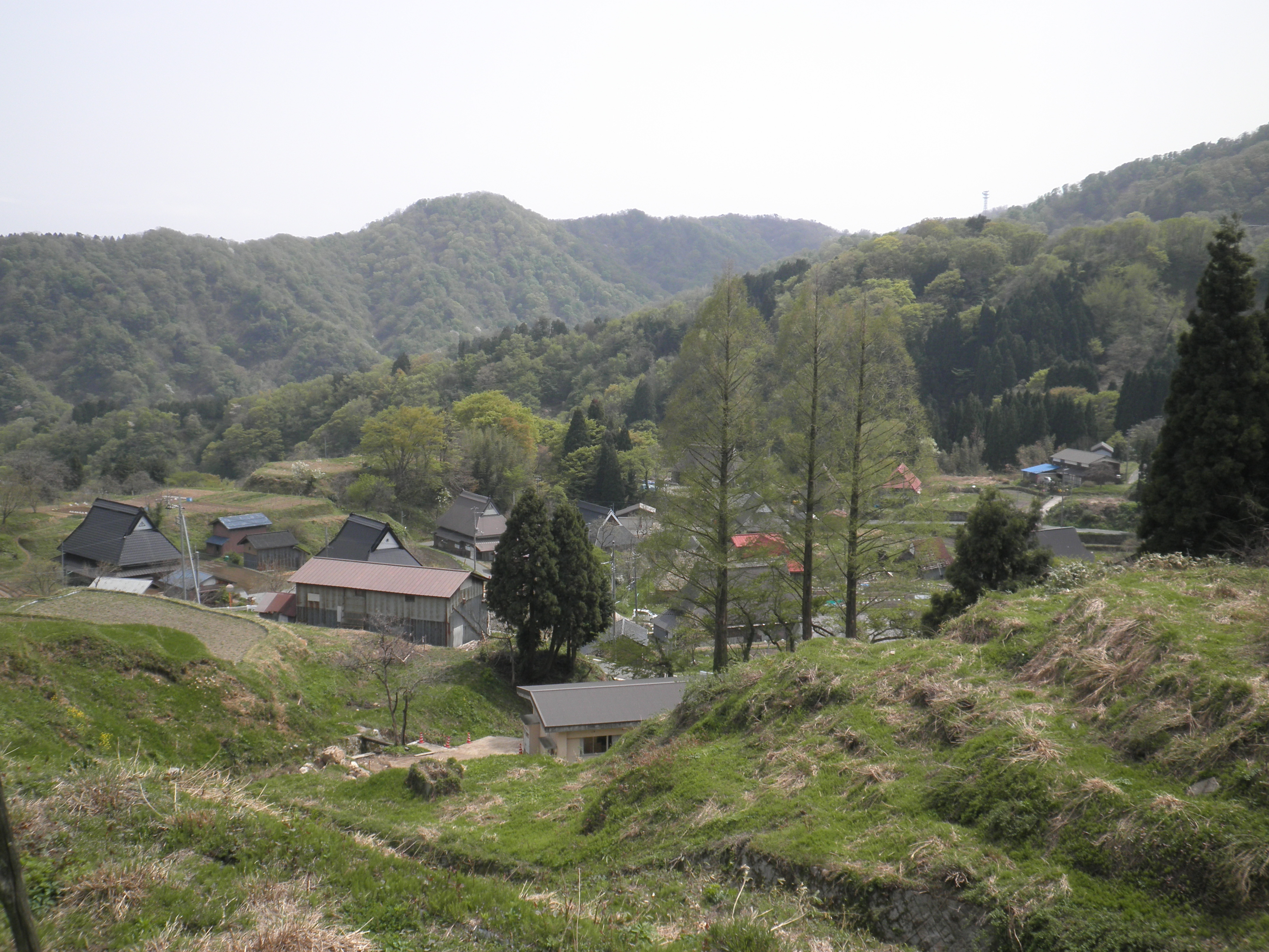 やや高いところから撮影した京都府ja:宮津市上世屋集落の全景